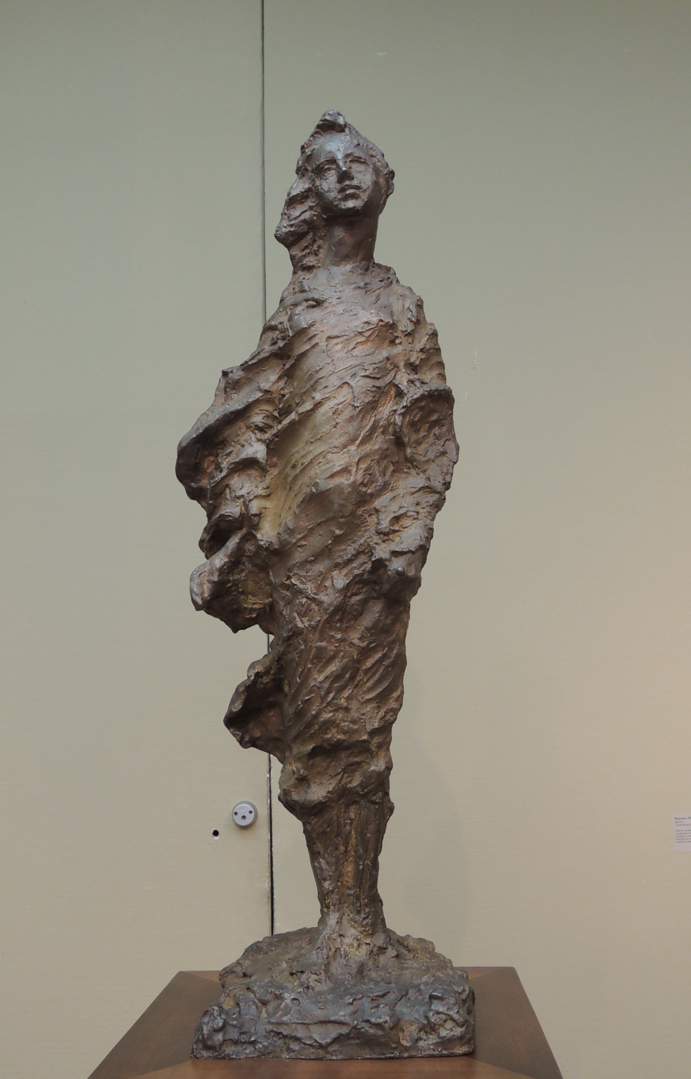 А.С. Голубкина. «Березка». 1927. ГТГ